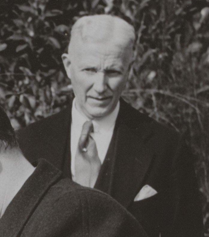 Collectie / Archief : Fotocollectie Elsevier Reportage / Serie : [ onbekend ] Beschrijving : oorlogsslachtoffers, weduwen, decoraties, Besseling Mw., Pape, Richard Datum : 18 maart 1954 Locatie : Gelderland, Steenderen Trefwoorden : decoraties, oorlogsslachtoffers, weduwen Persoonsnaam : Besseling Mw., Pape, Richard Fotograaf : Fotograaf Onbekend / Anefo Auteursrechthebbende : Nationaal Archief Materiaalsoort : Foto (zwart/wit) Nummer archiefinventaris : bekijk toegang 2.24.05.02 Bestanddeelnummer : 093-0422